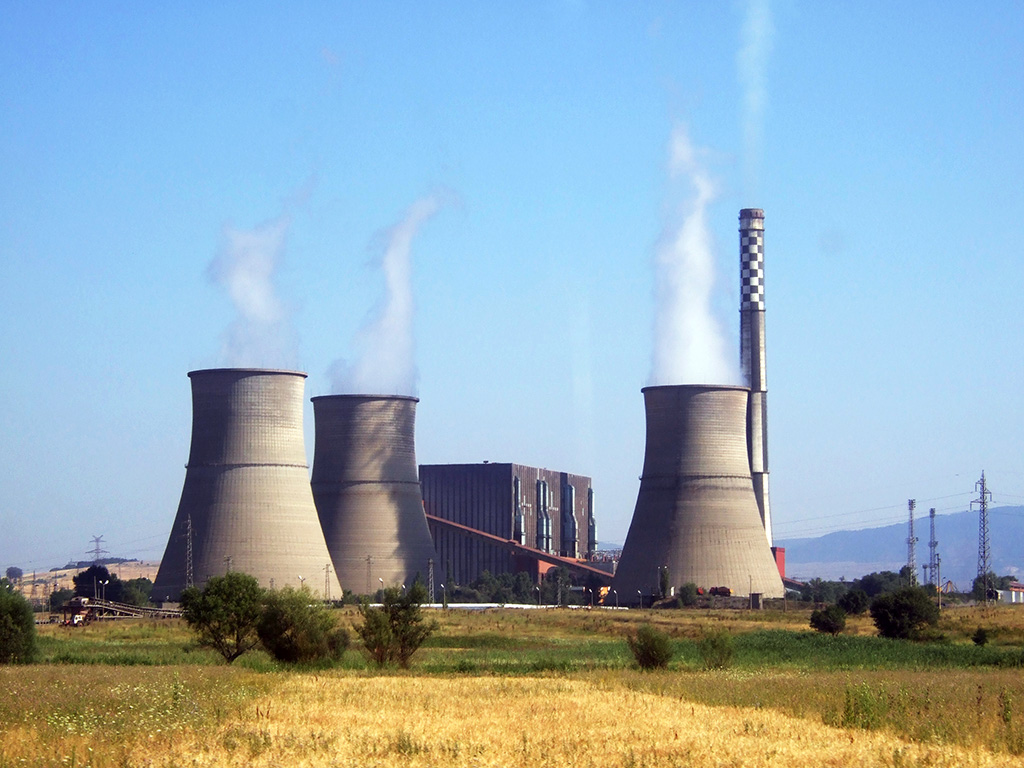 ТЕЦ Бобов дол в цялата му прелест. Е, почти цялата. Сниман в полу-заспало състояние, в една много, много ранна неделна утрин, през стъклото на бързодвижещ се рейс.